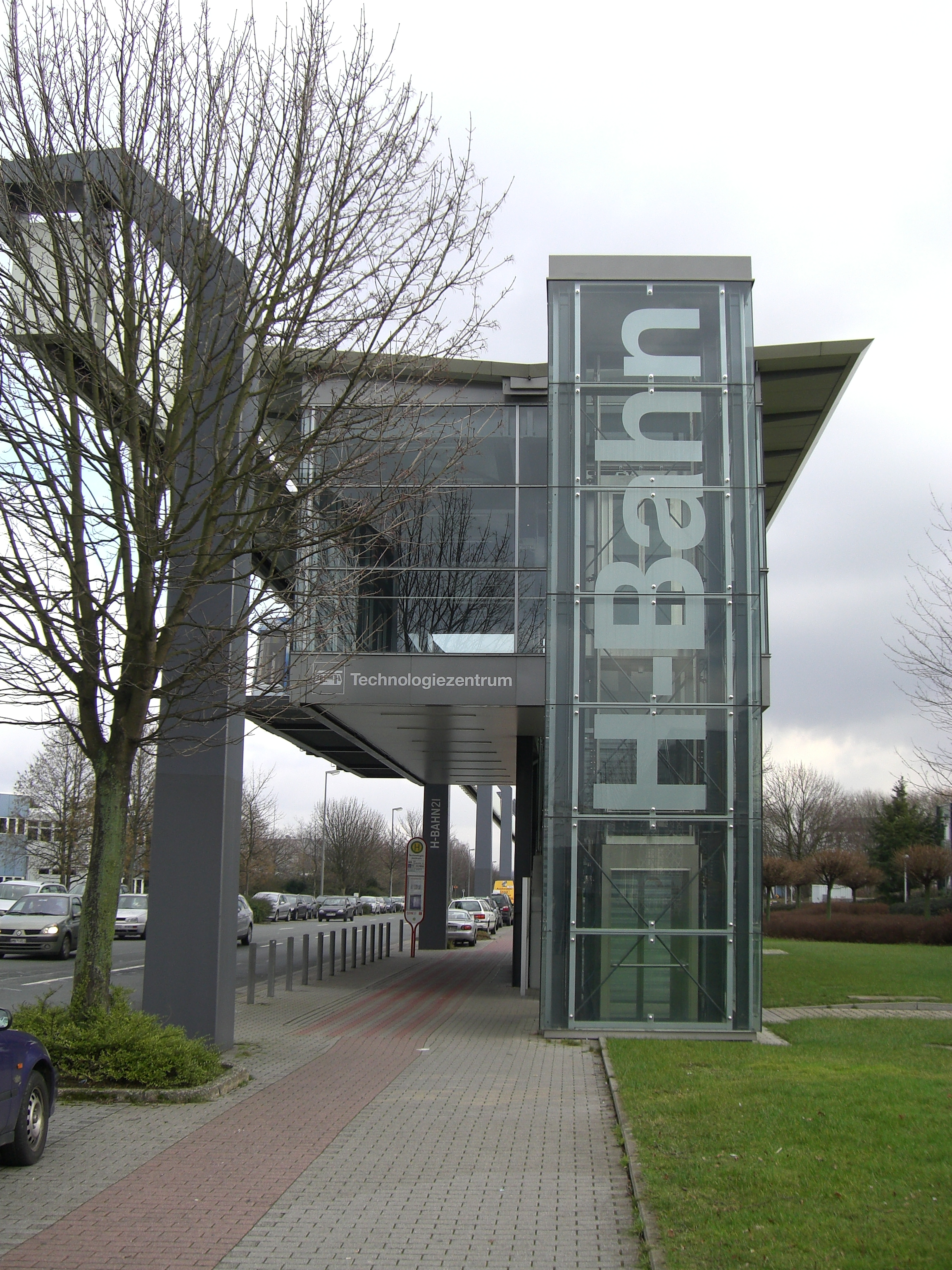 Dortmund H-Bahn Haltestelle Technologiezentrum